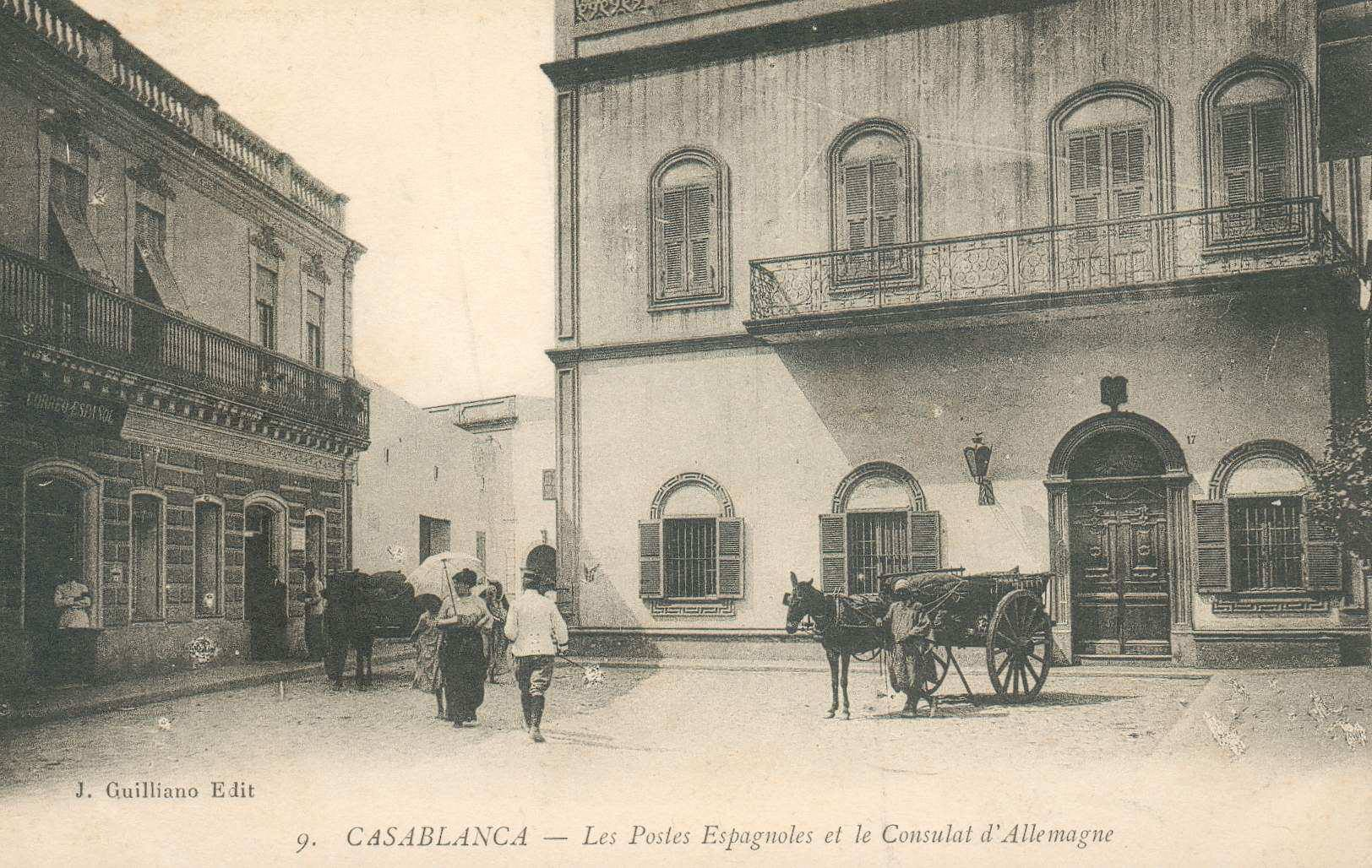 صورة للبريد الإسباني والقنصلية الألمانية في مدنية الدار البيضاء